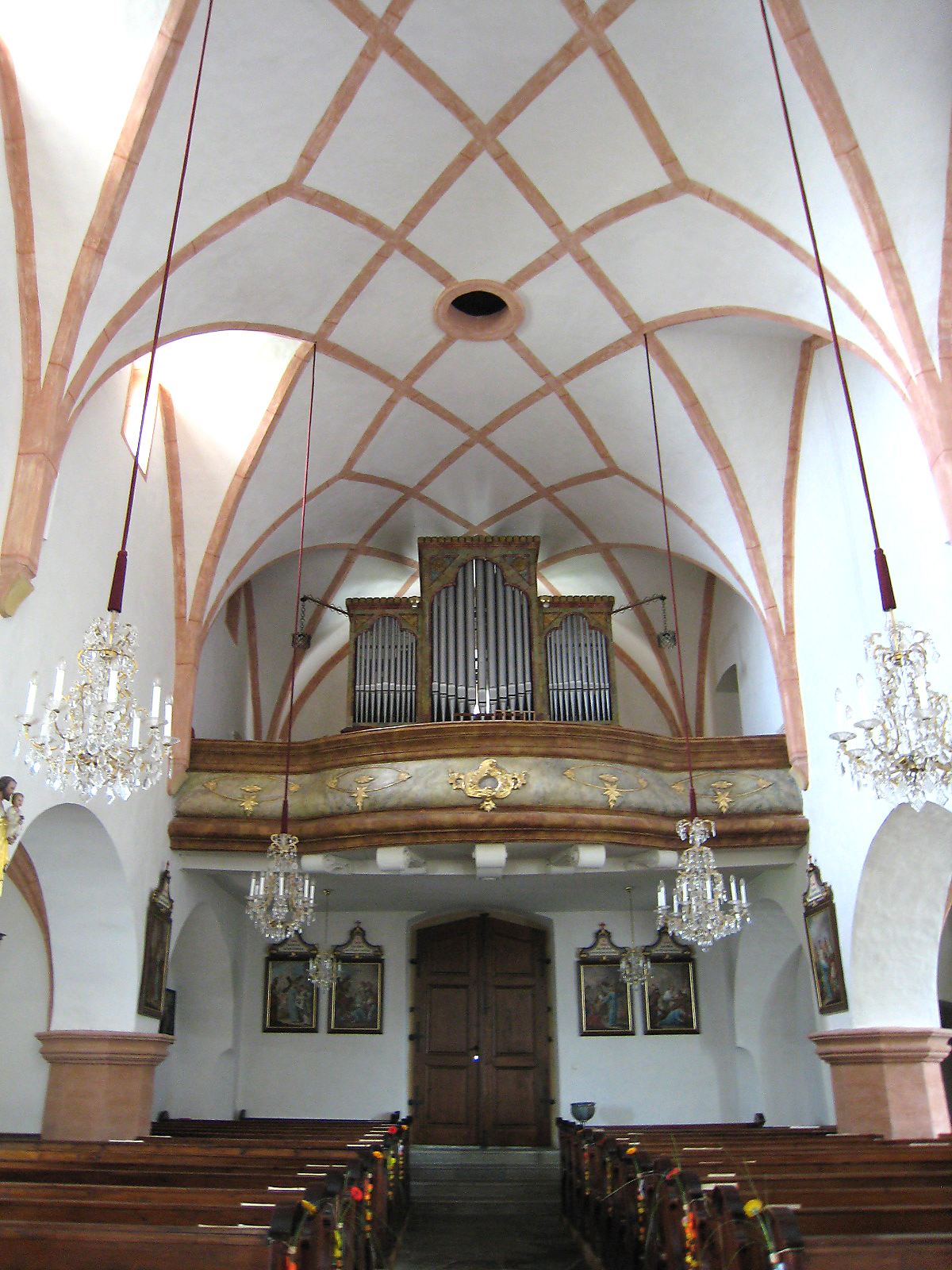 Kath. Pfarrkirche hl. Jakobus d. Ä. und Friedhof